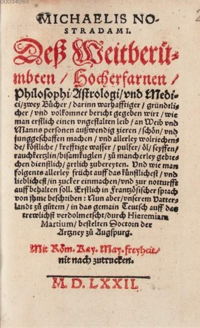 Nostradamus, Excellent ... opuscule, German translation, 1572, title page